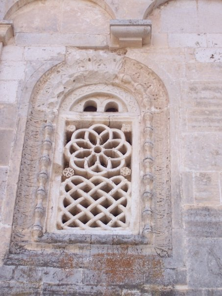 san leonardo in lama volara (manfredonia)